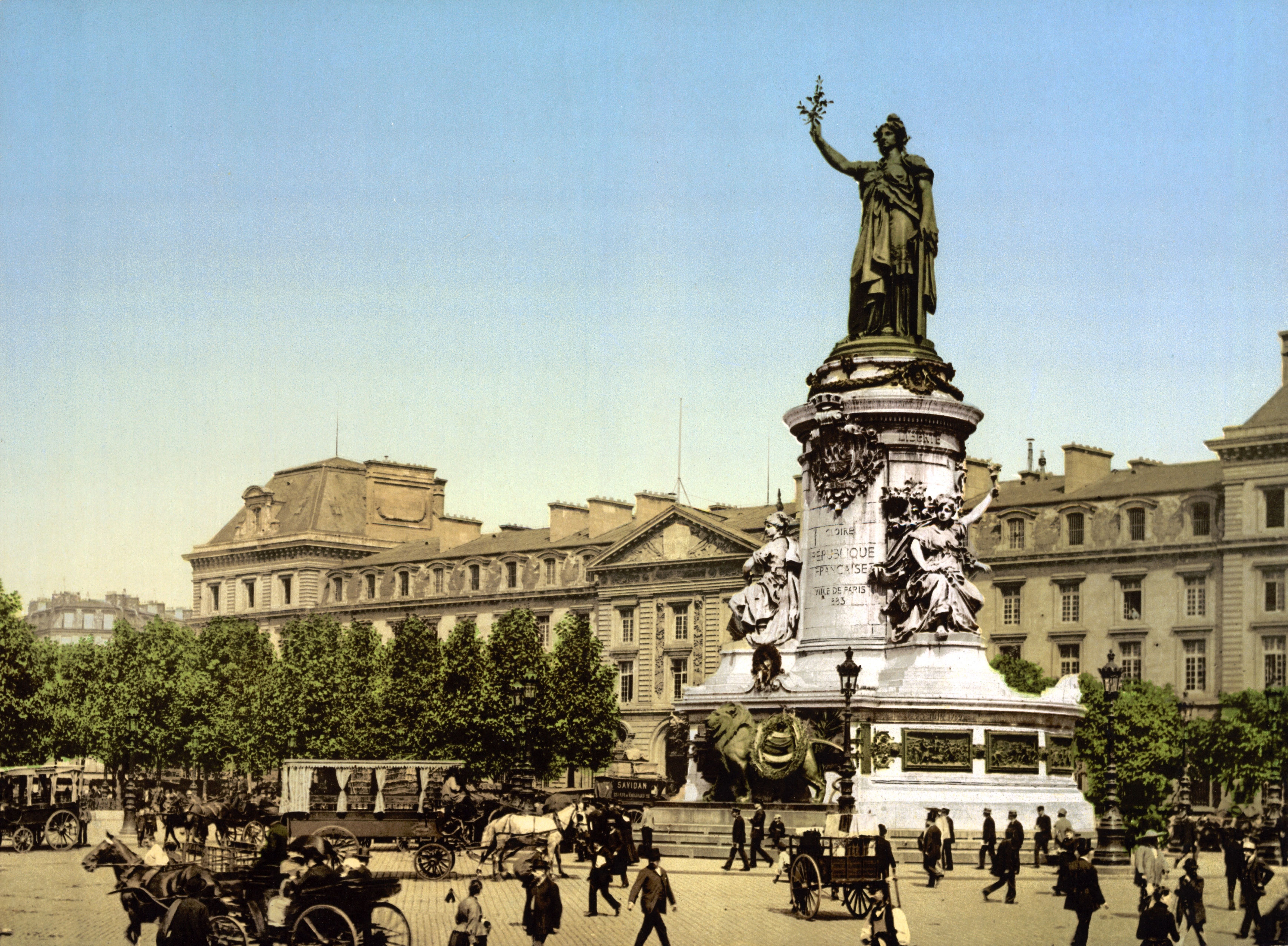 Place de la Republique, Paris, France.